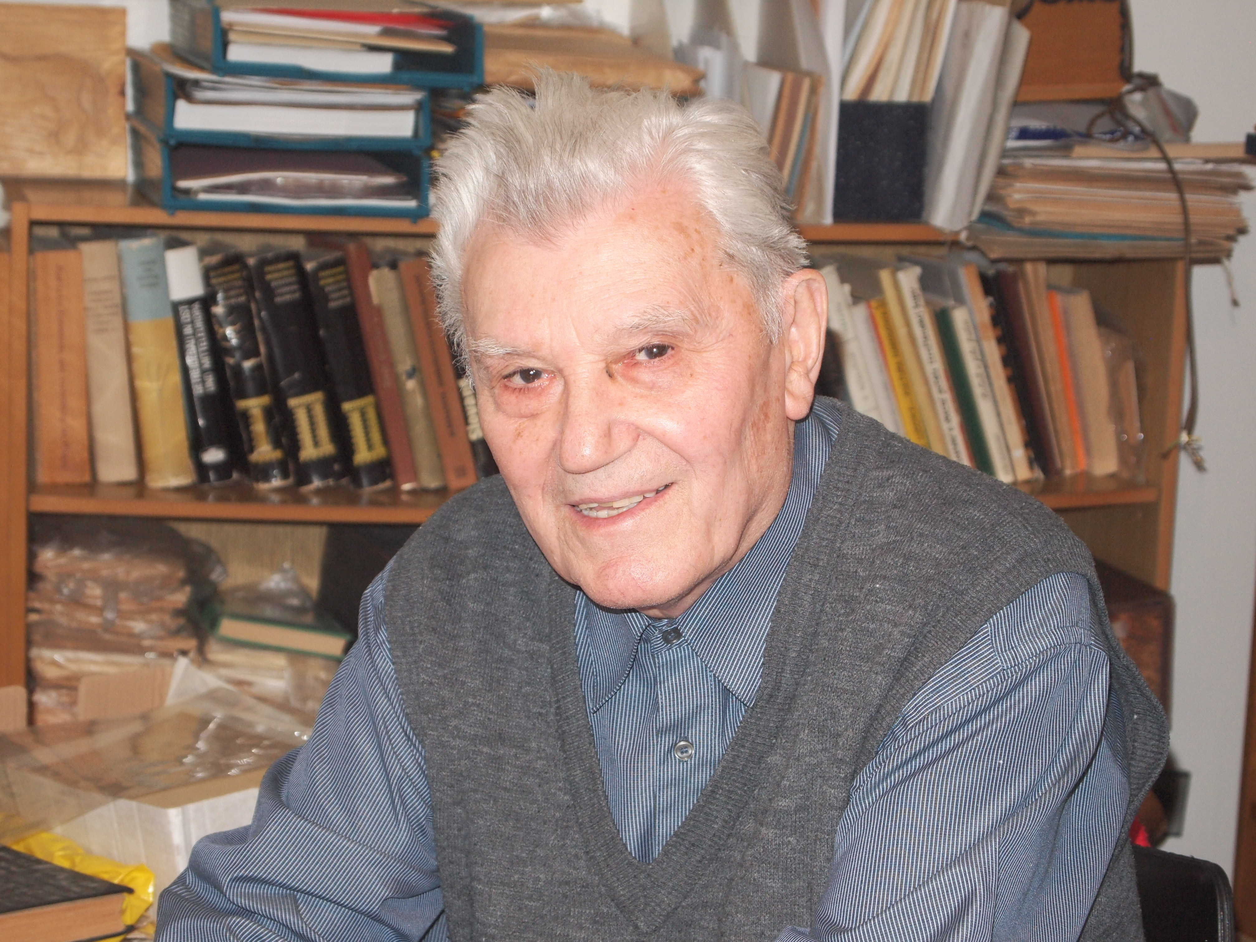 slovenský etnológ